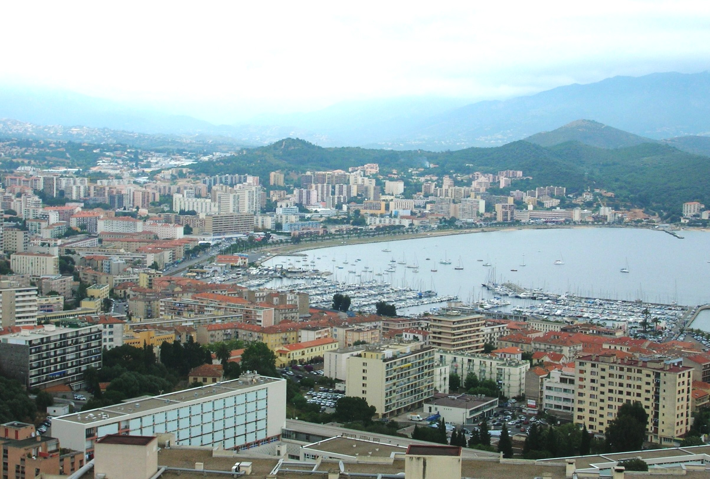 Vue iwwer Ajjaccio.